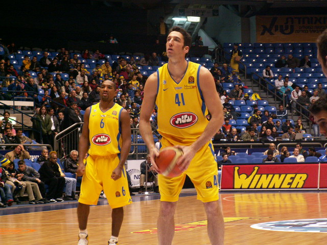 יניב גרין